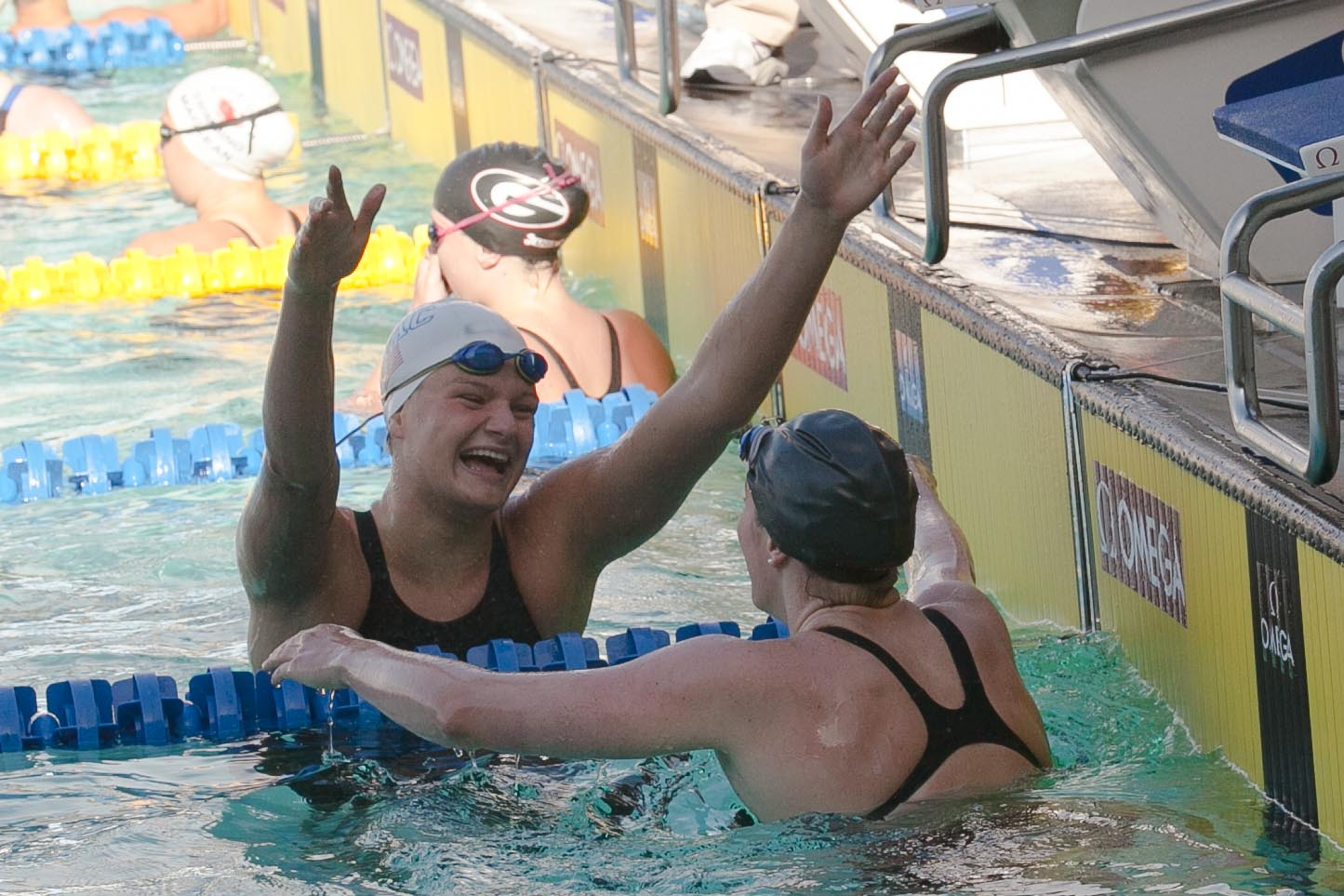 Cierra Runge & Missy Franklin after 200m free